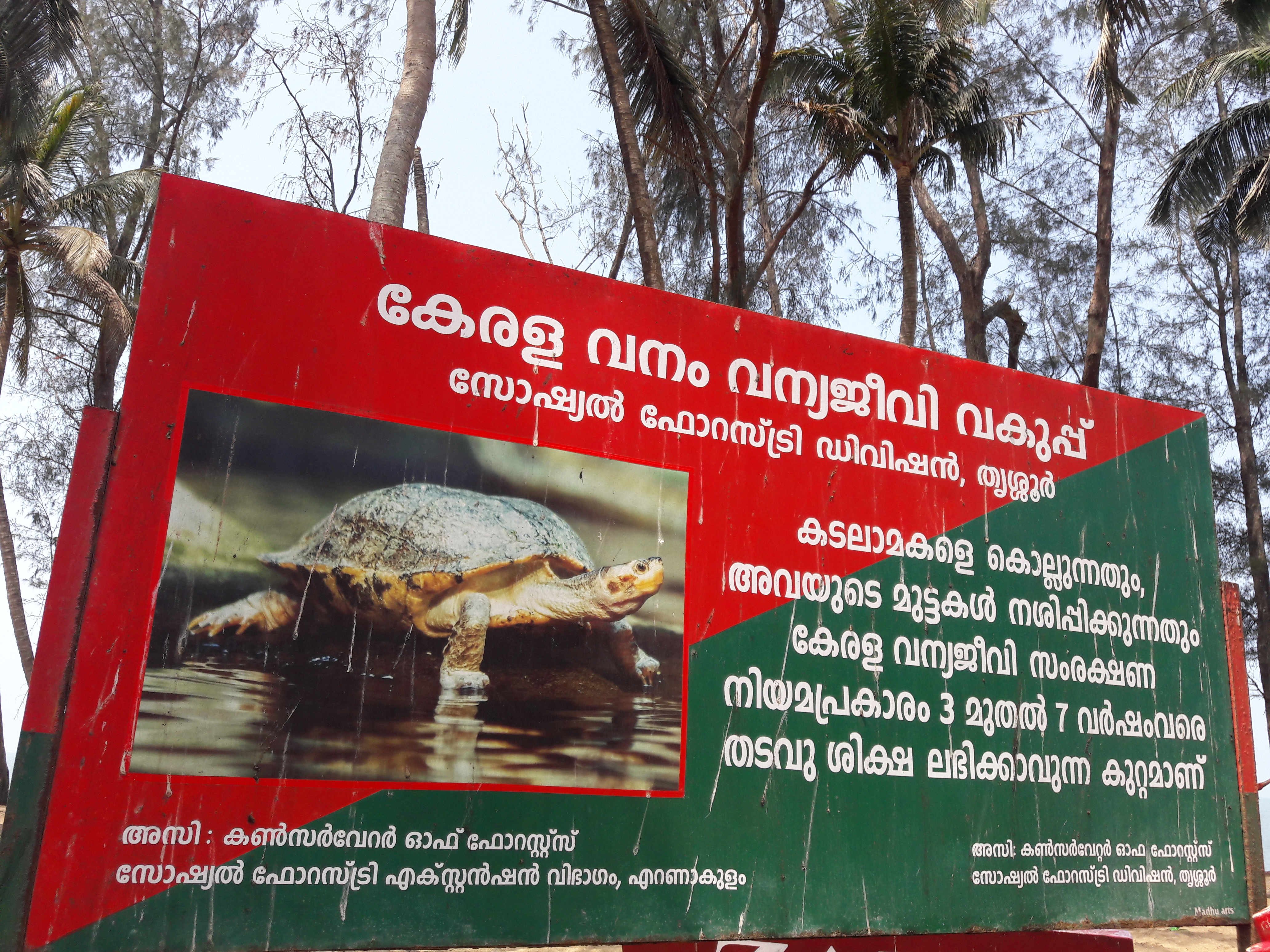 തൃശ്ശൂര്‍ ജില്ലയിലെ ചാവക്കാട് താലൂക്കിലെ പെരിയമ്പലം ബീച്ചില്‍ നാട്ടിവെച്ചിരിക്കുന്ന കടലാമ സംരക്ഷണവുമായി ബന്ധപ്പെട്ട സൂചനാ ഫലകം.